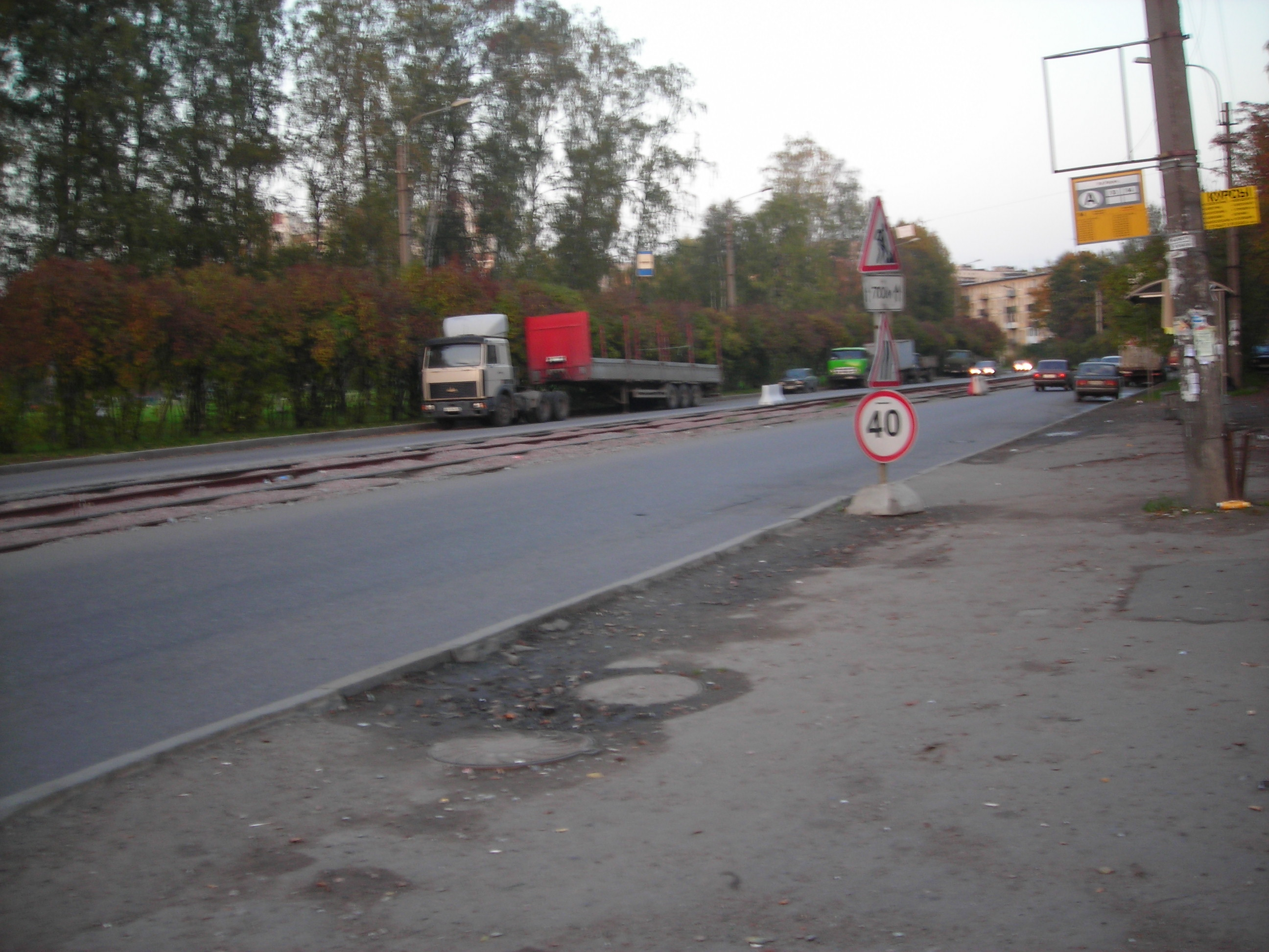 Prospect Nauki, St. Petersburg